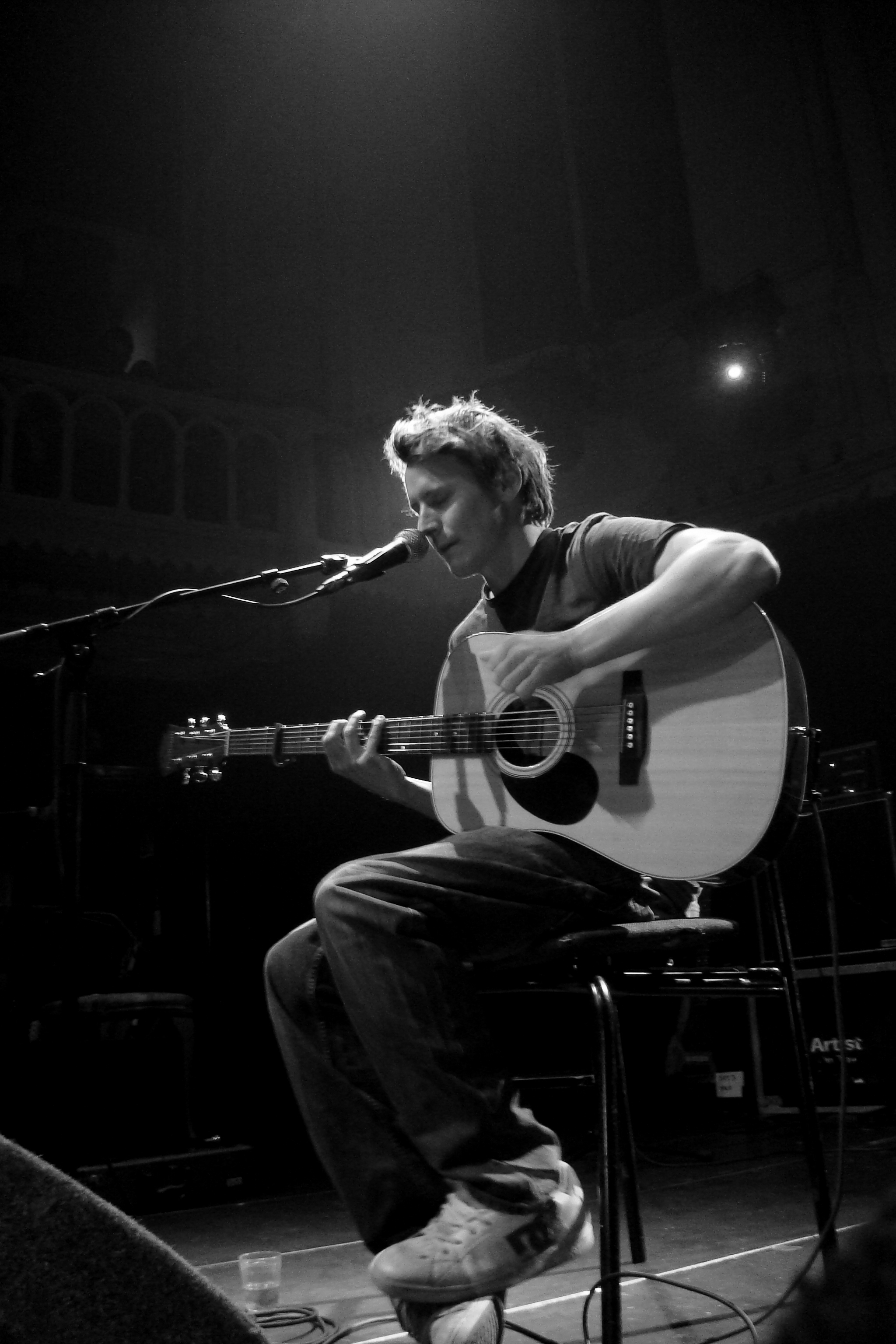 Ben Howard tijdens een optreden in Paradiso, Amsterdam